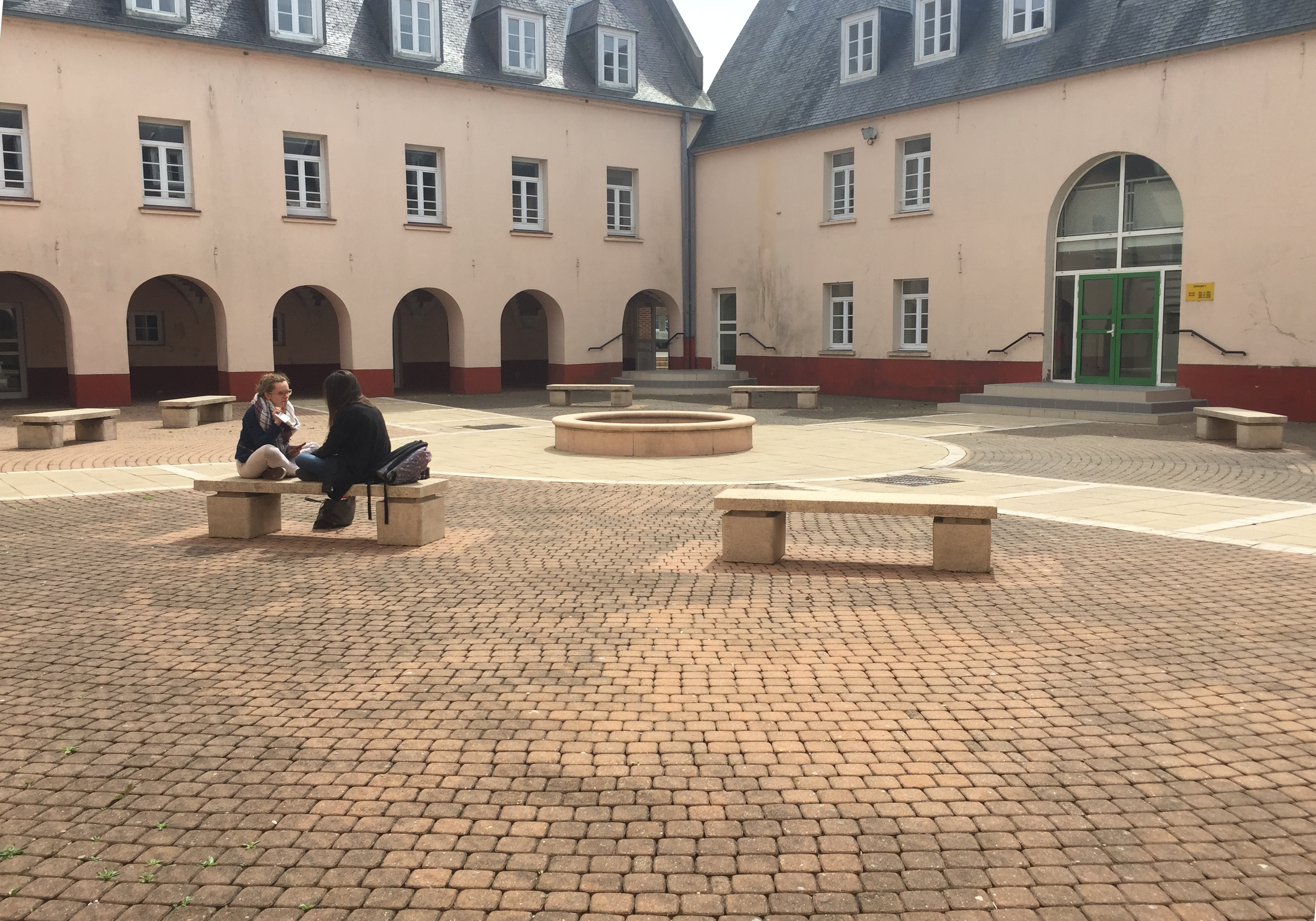 Cour du lycée